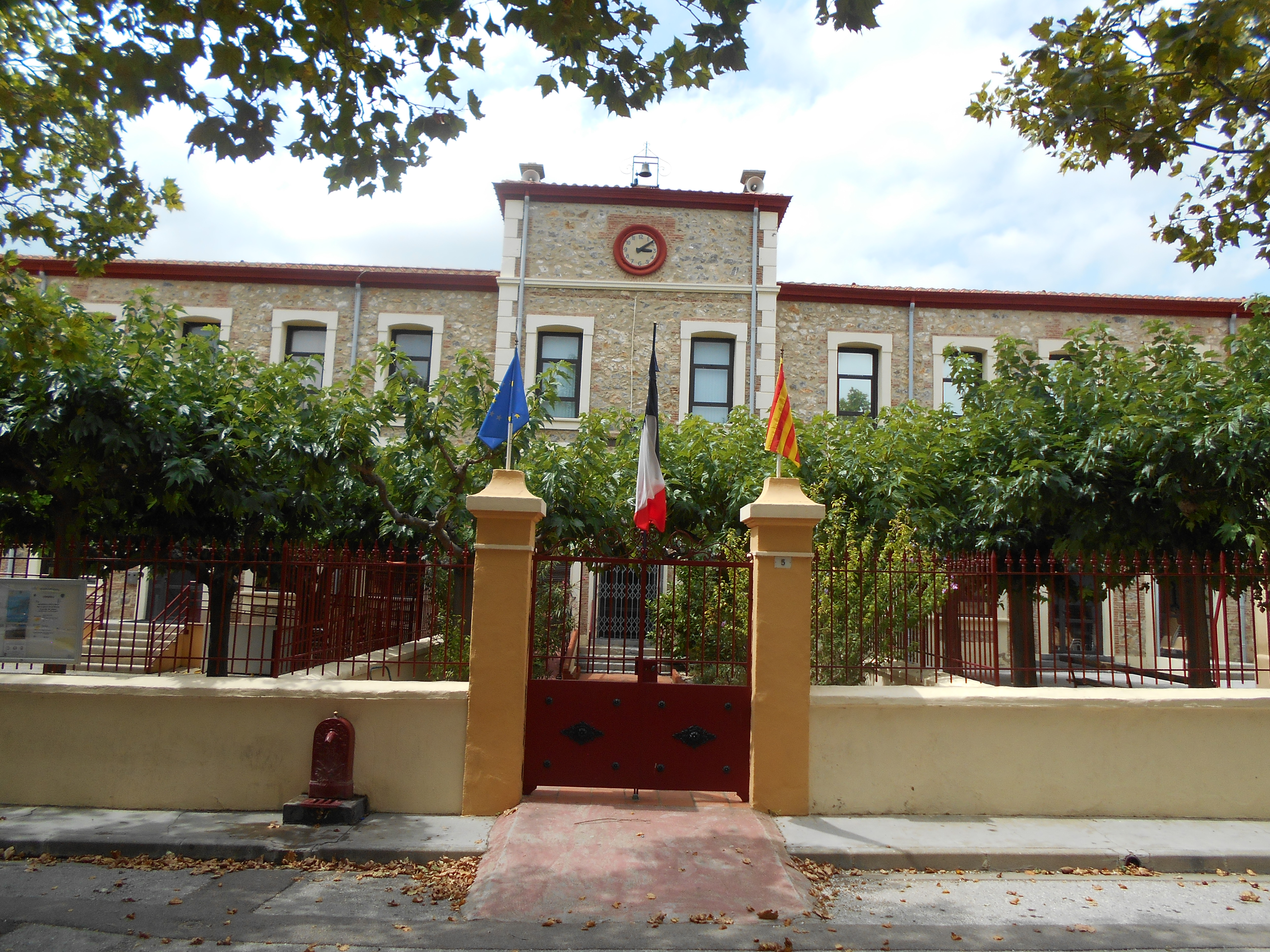 Casa del Comú de Vingrau